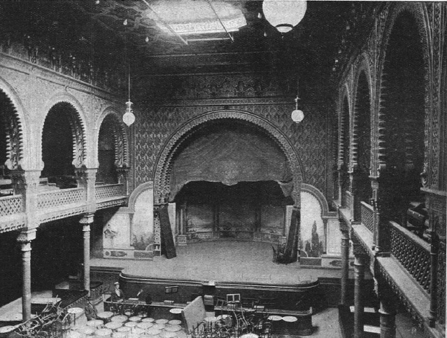 Sveasalen innan branden 1899